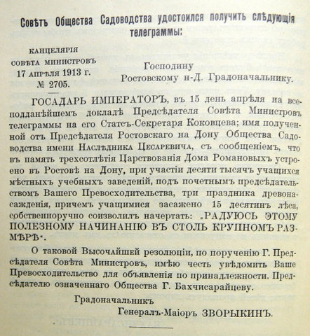 Ростов-на-Дону, Праздник деревонасаждения - поздравление Императора